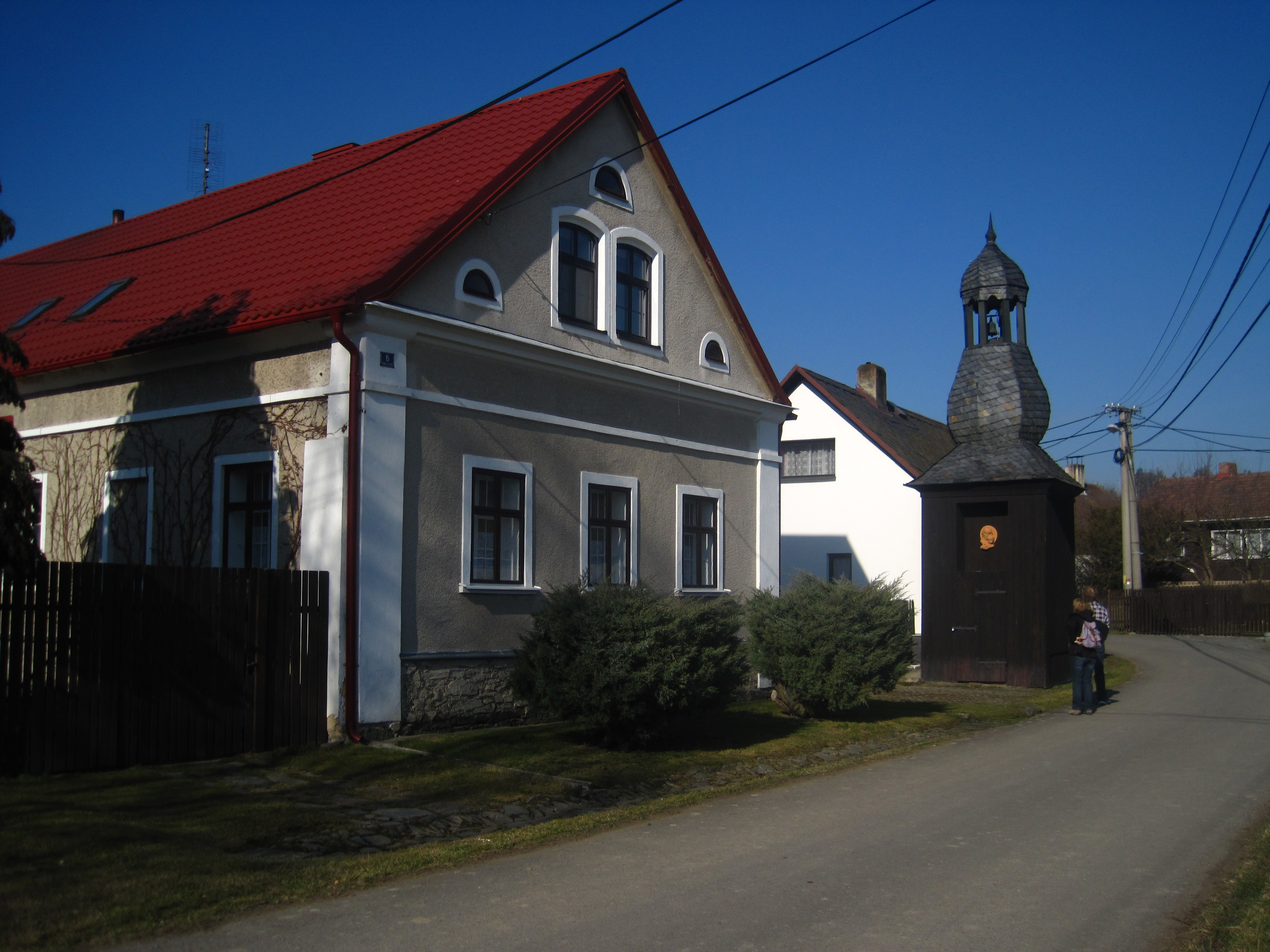 Zvonička, náves, st. 134, Pocheň (Brumovice).